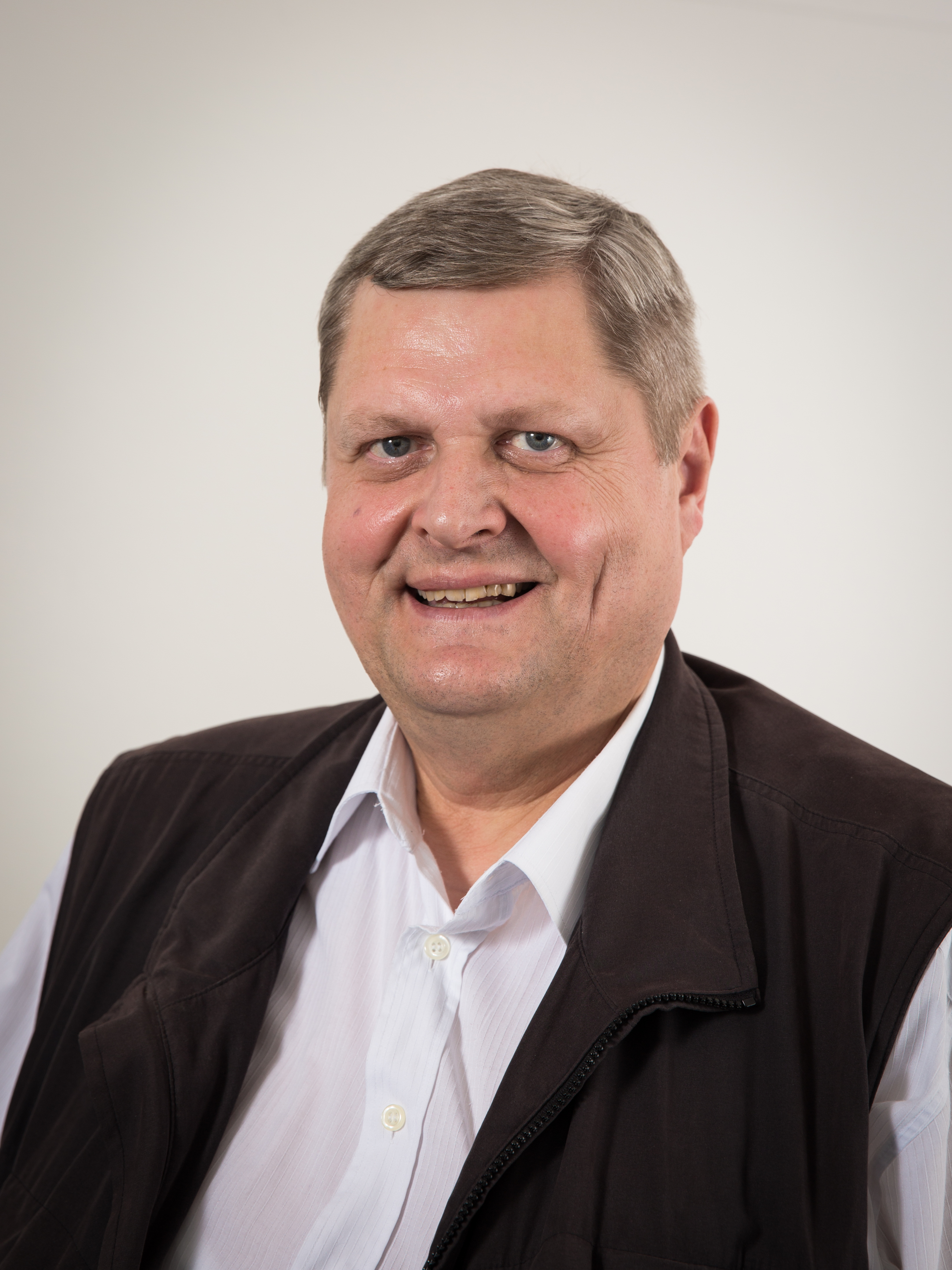 Der saarländische Landtagsabgeordnete Hermann-Josef Scharf